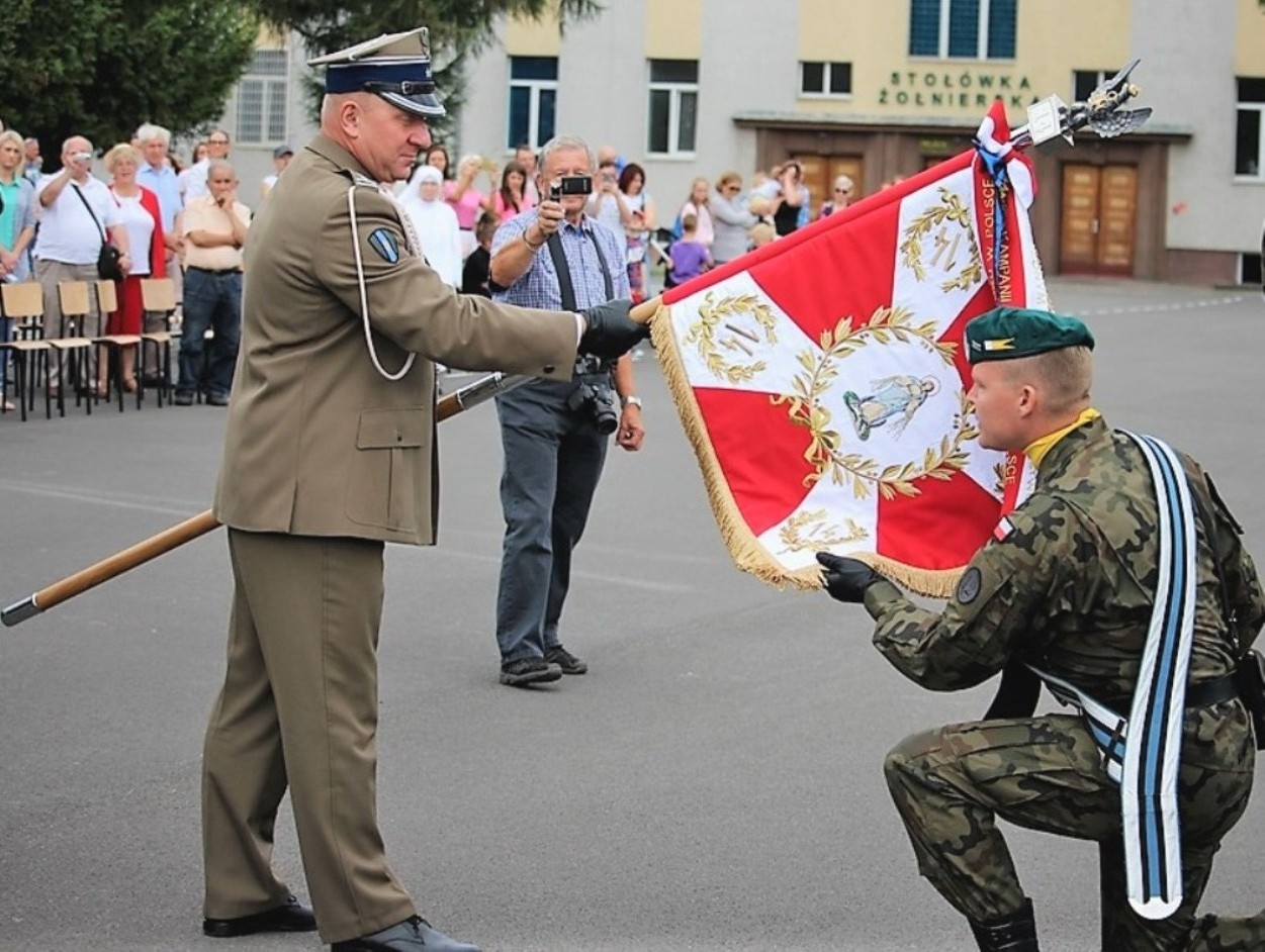 Dowódca ppłk Piotr Balon z repliką sztandaru